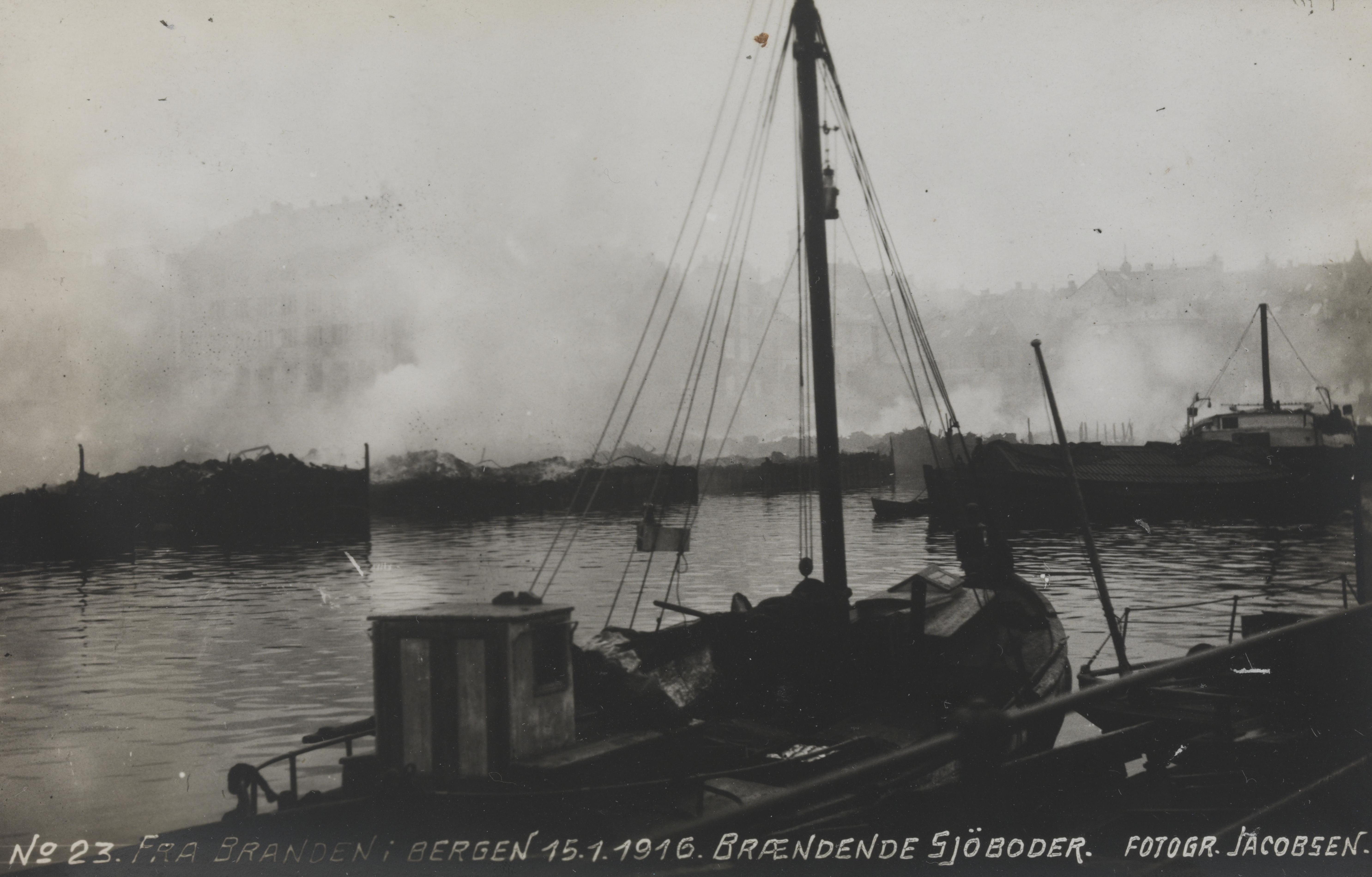 Bildet er hentet fra Nasjonalbibliotekets bildesamling Bergen, Hordaland